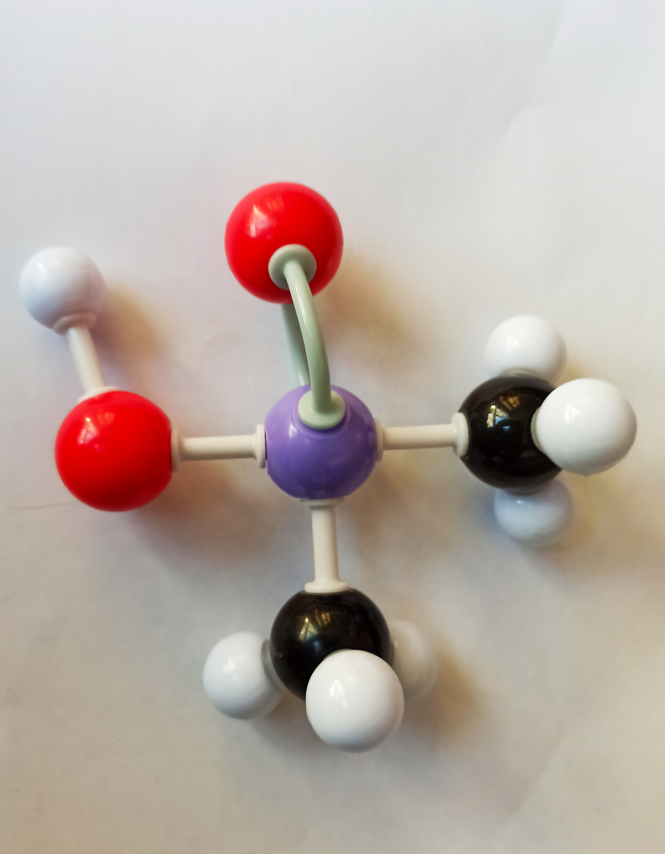 кульк-стрижнева модель диметилфосфінової кислоти.